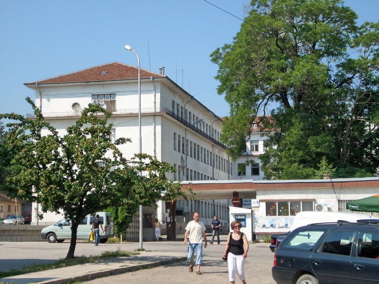 Общ изглед към болницата на град Попово